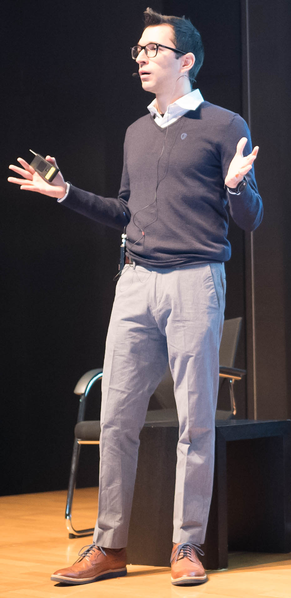 ML@Tokyo